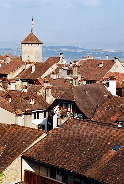 Murten: Blick auf die Häuser der Altstadt